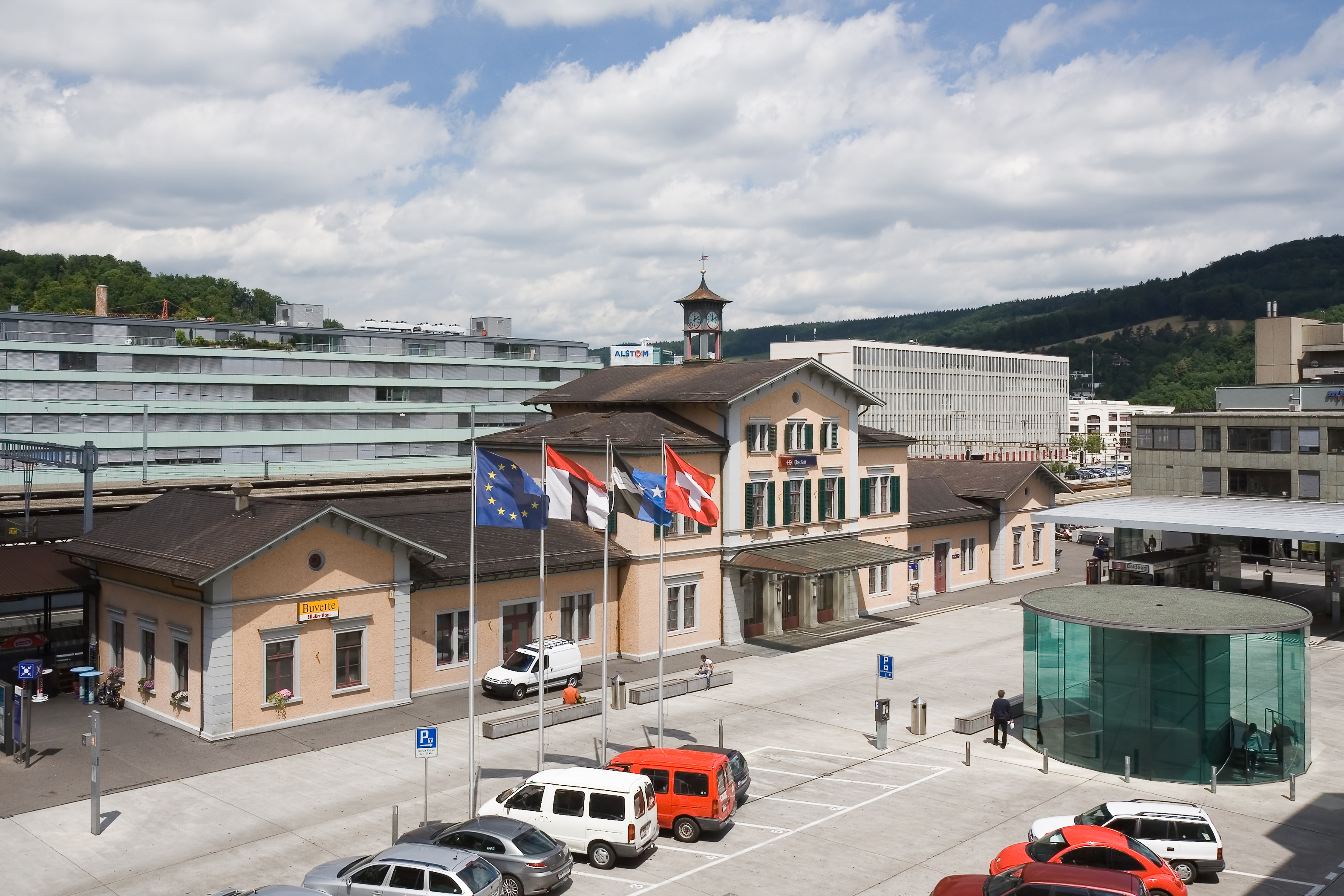 Stationsgebäude des Bahnhofs Baden, geplant 1846, erbaut 1846/47 nach Plänen von Ferdinand Stadler[1] Aufgenommen von der Terrase des Coop-Restaurants ↑ Andreas Hauser: Ferdinand Stadler. Zürich : Krauthammer (1976).